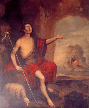 La obra representa al profeta San Juan Bautista, precursor del Mesías.